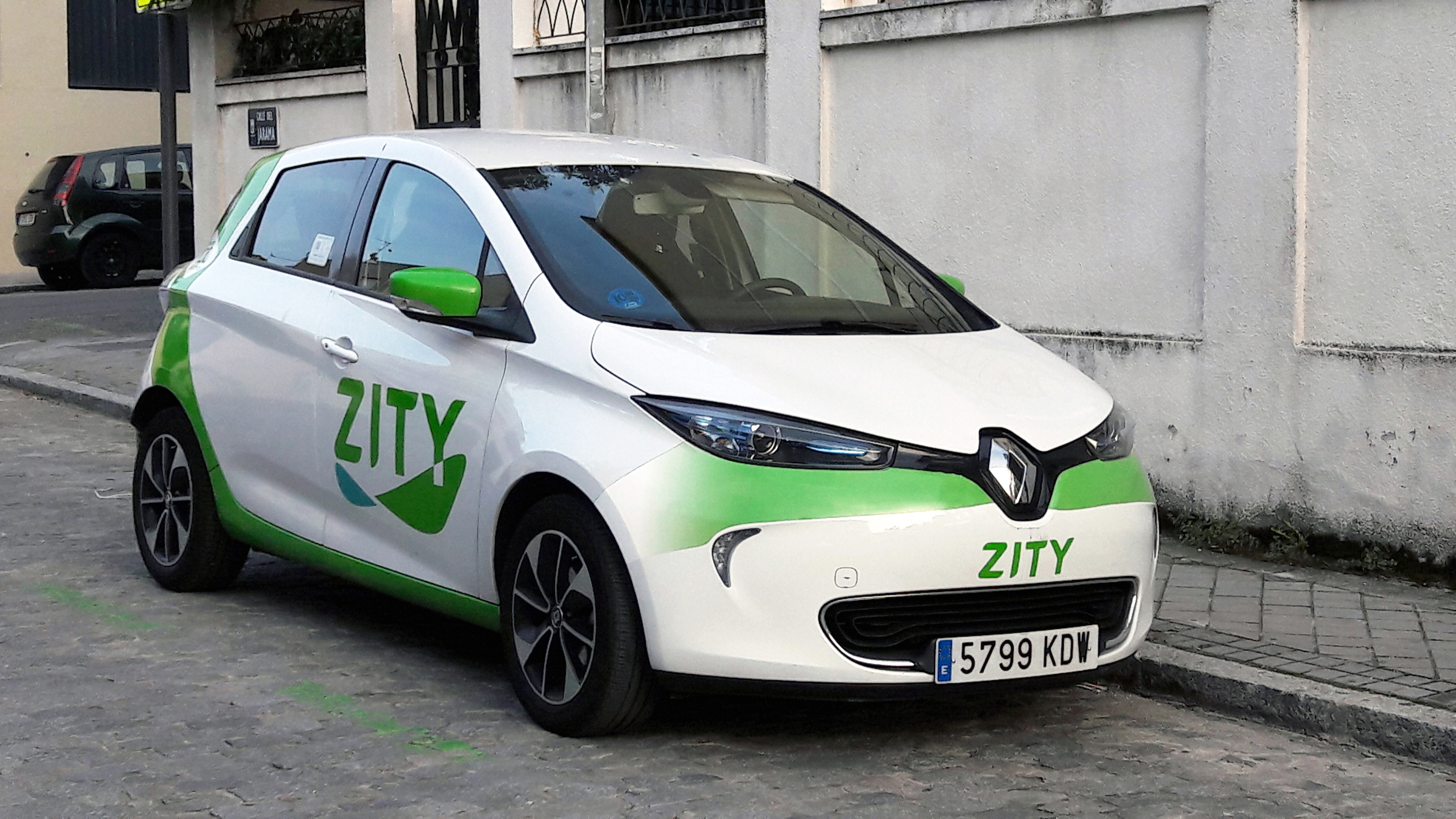 Renault ZOE de la empresa ZITY